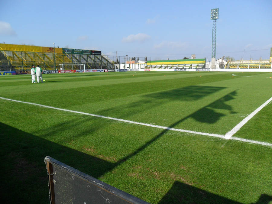 Estadio de defensa y justicia